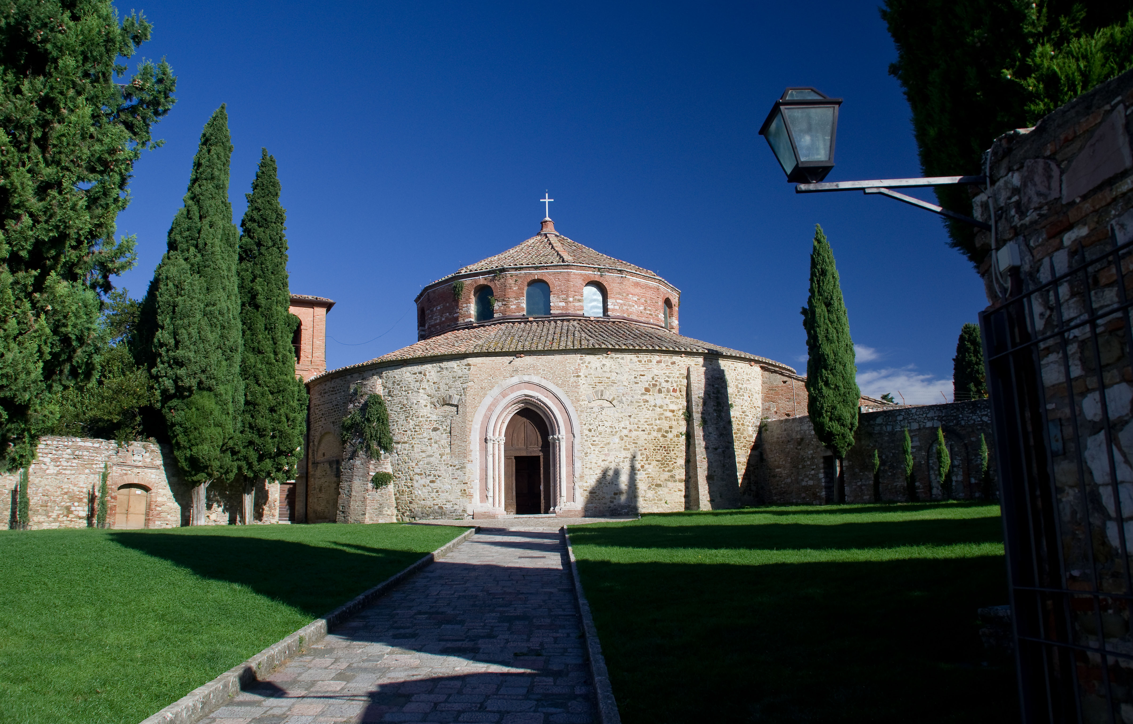 Tempio di S.Angelo (Chiesa di S.Angelo) This is a photo of a monument which is part of cultural heritage of Italy.